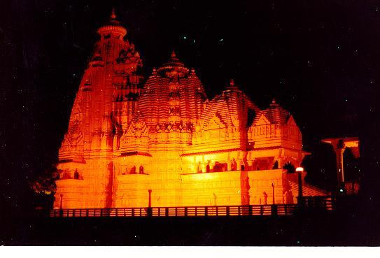 Saraswathi Temple, BITS Pilani, Rajasthan, India